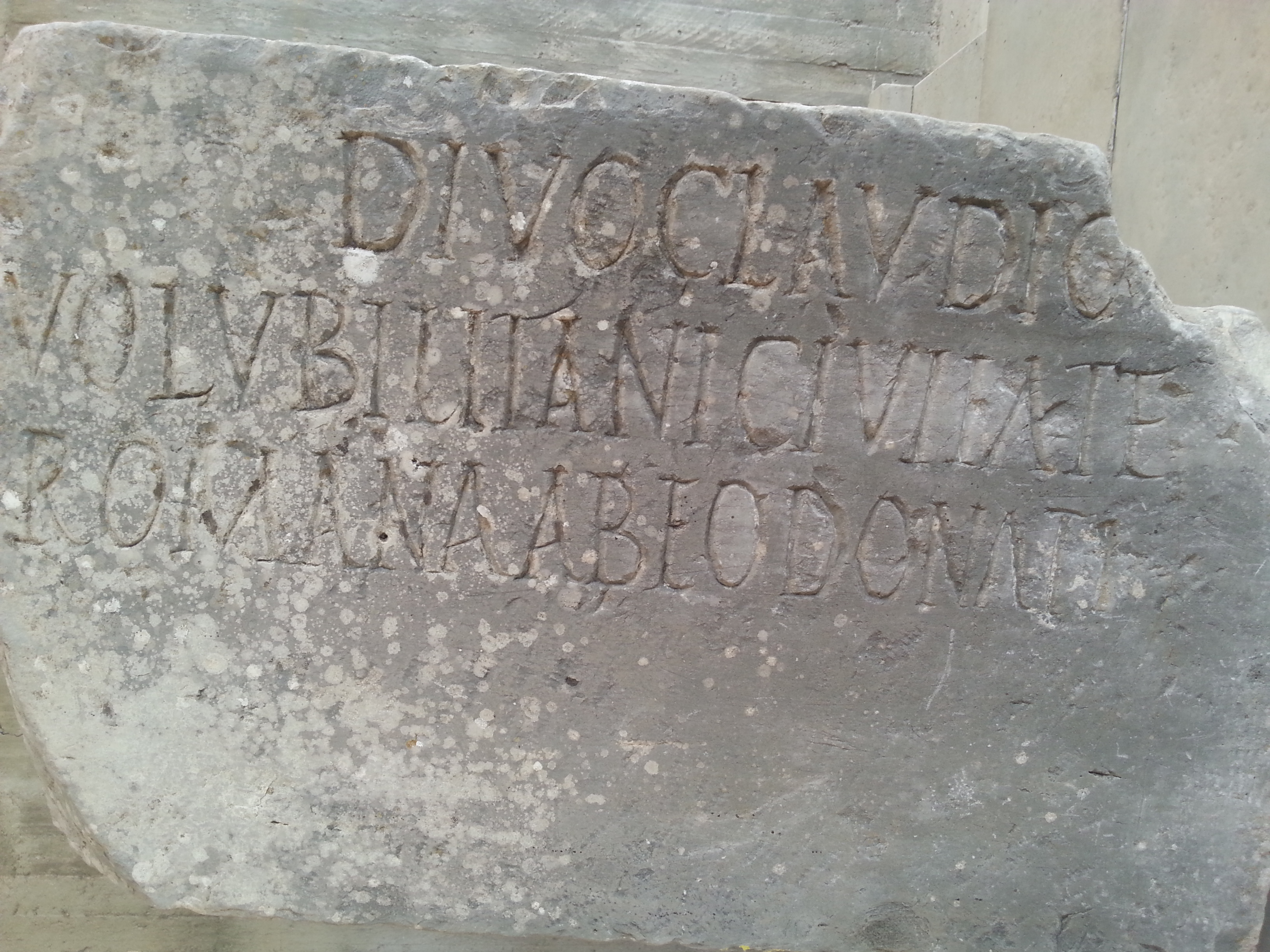 La inscripción recuerda la transformación de Volubilis en municipio romano, bajo el reinado de Claudio, quien concedió a los habitantes de Volubilis la ciudadanía romana. Base de estatua inscrita sobre dos caras, encontrada en 1923 en una sala al este del área del capitolio. Calcárea.